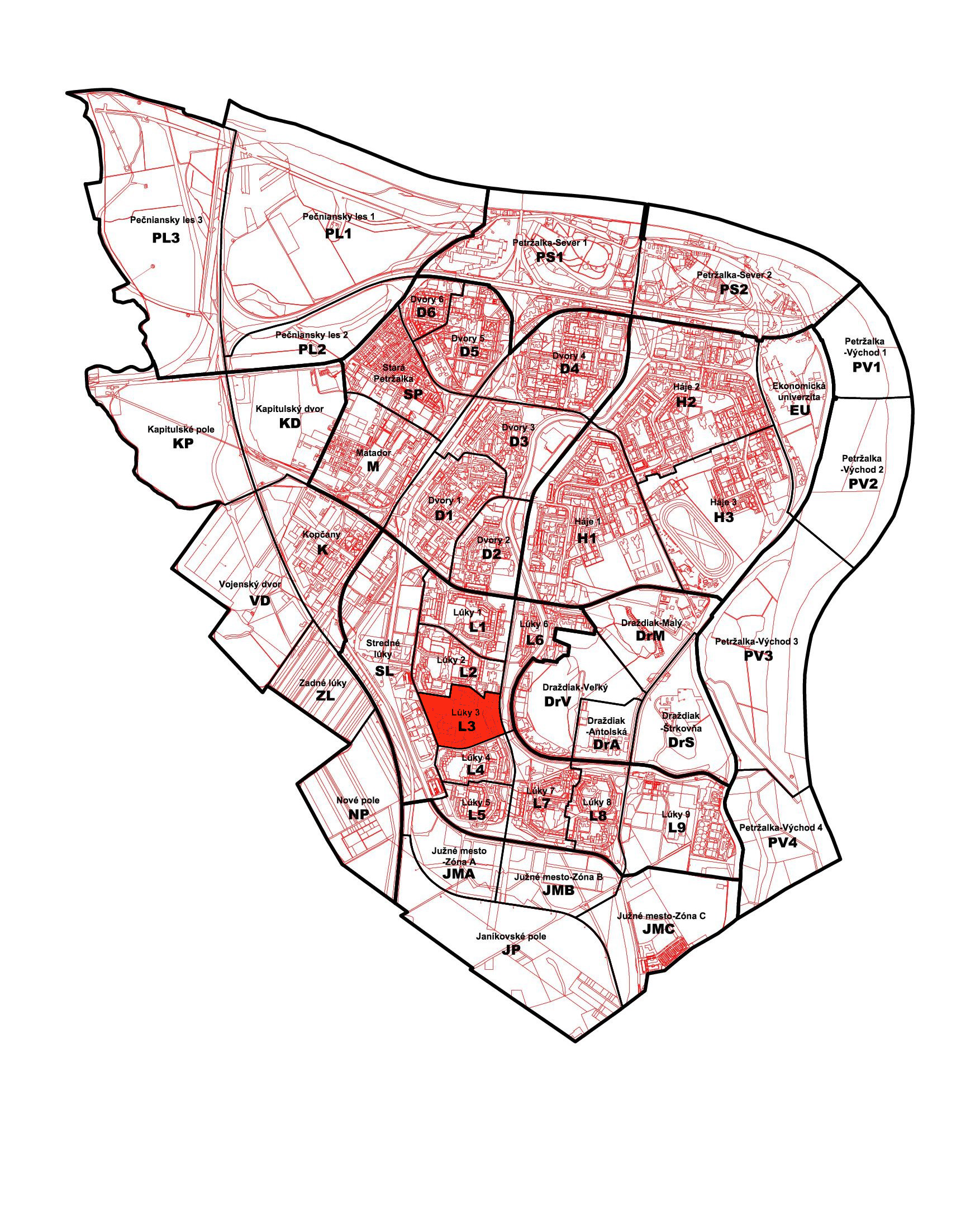 Poloha petržalskej miestnej časti